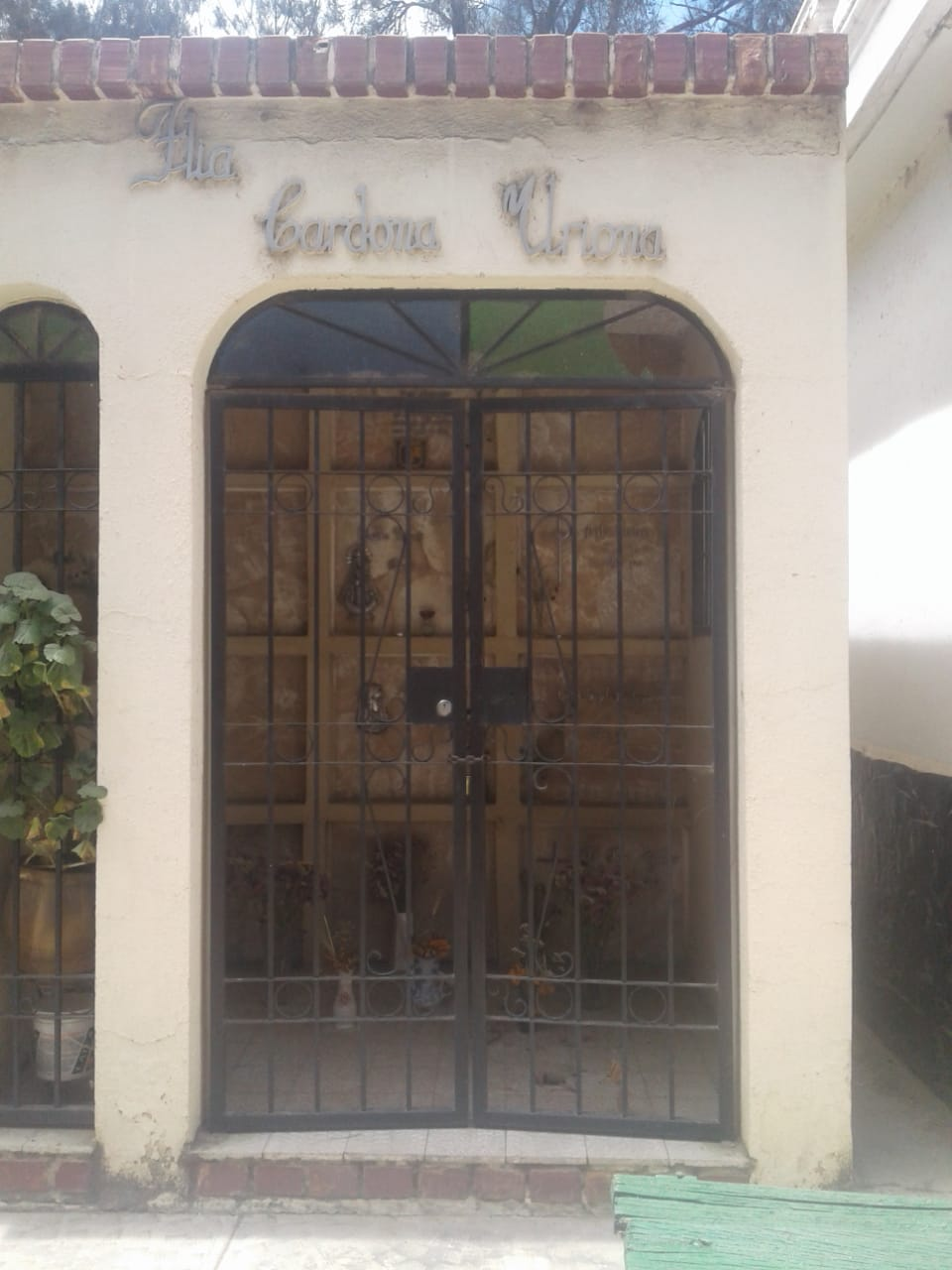 puerta del mausoleo cardona uriona en la fachada